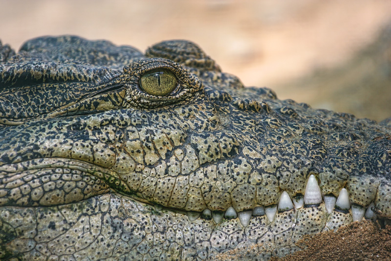 عکس : امیررضا توسلی